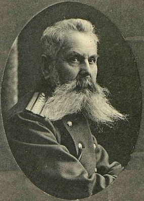 Измаил Мурза Муфтий-Заде (январь 1841 — апрель 1917) — полковник в отставке, депутат Государственной думы III созыва от Таврической губернии.